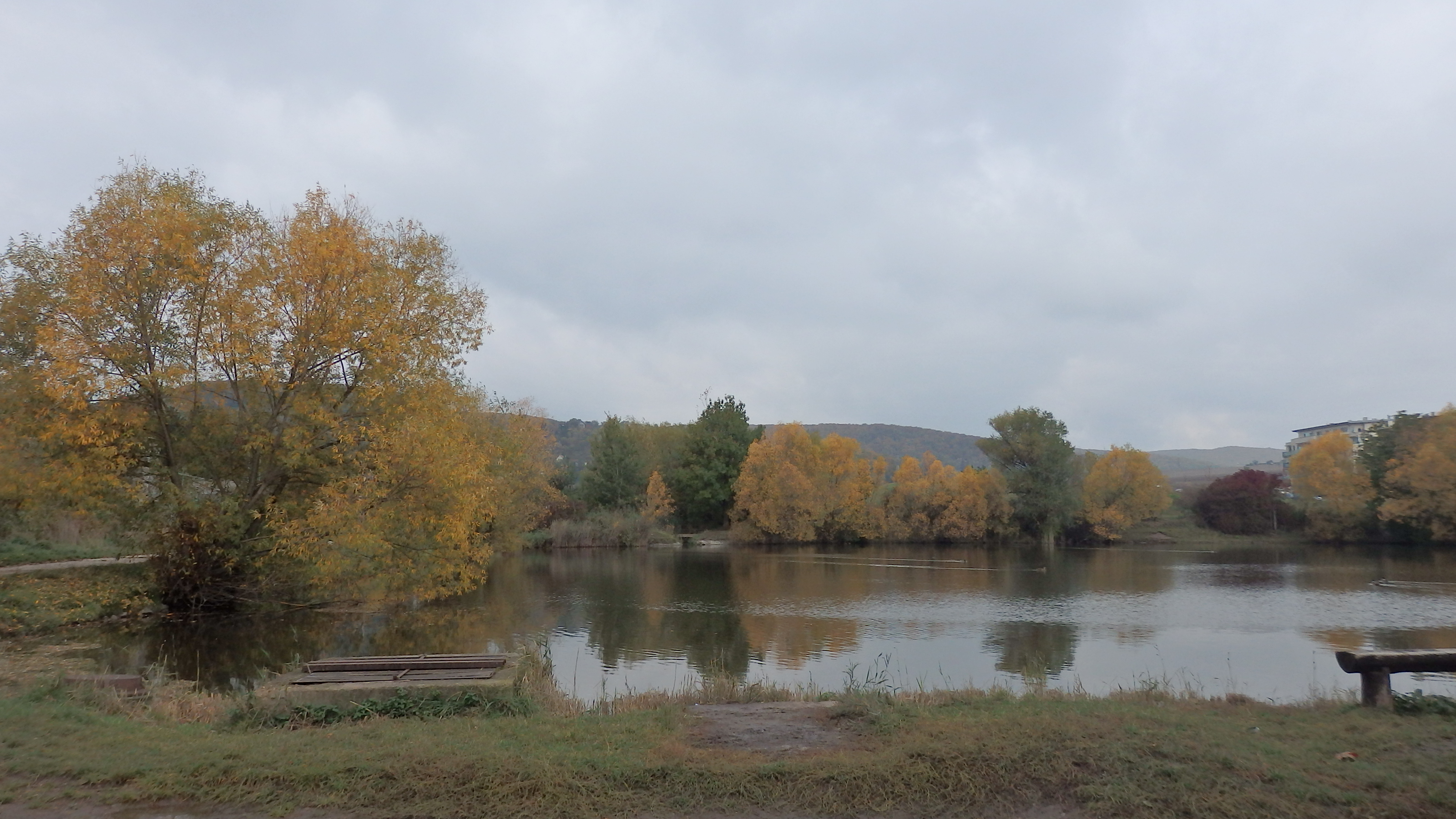 Medlánecká naučná stezka, Brno-Medlánky, Medlánecký rybník